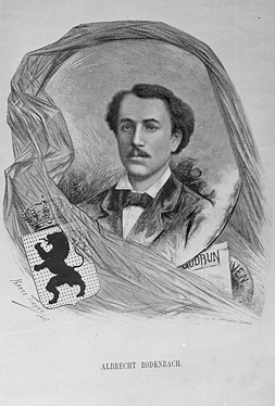 Portret van Albrecht Rodenbach